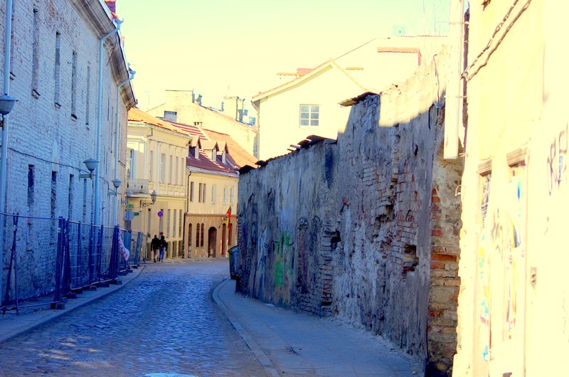 Bokšto gatvė